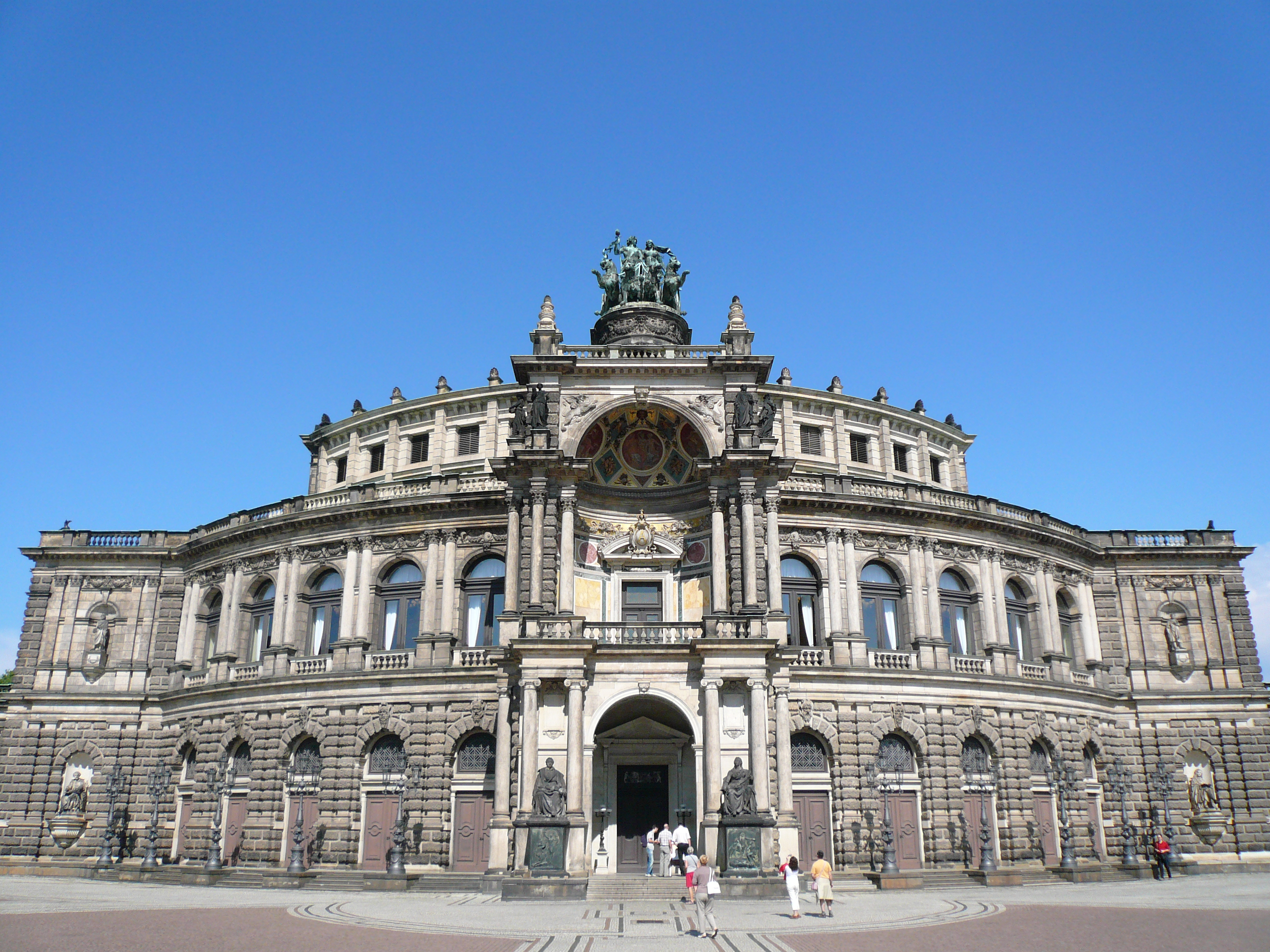 Semperoper in Dresden